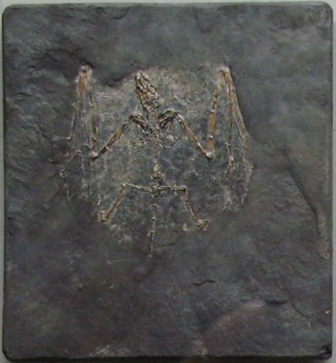 Fossile Fledermaus (Palaeochiropteryx) - aufgenommen im Museum am Löwentor, Stuttgart